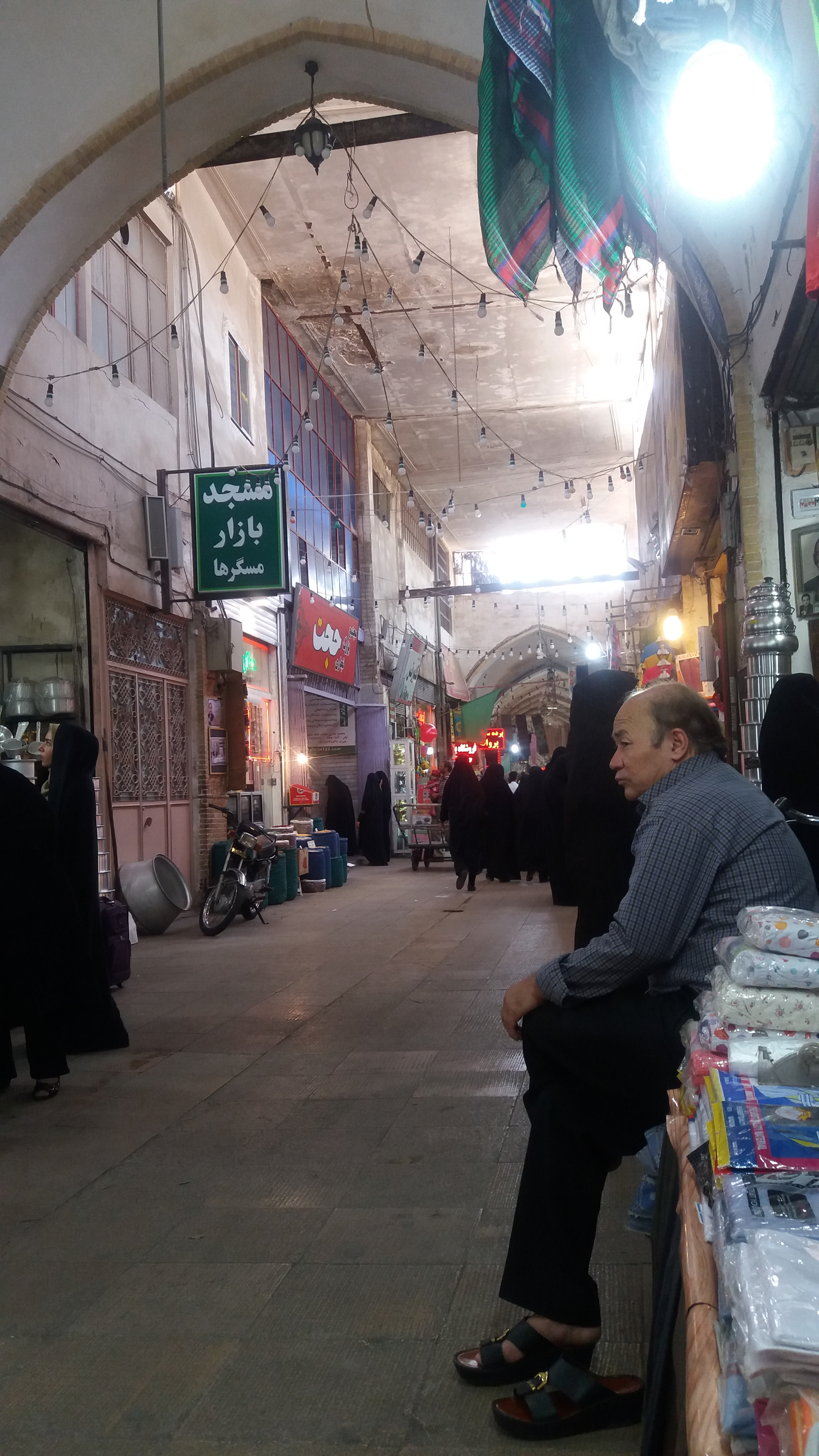 بازار بزرگ قم - ۱۳۹۵